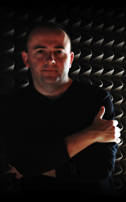 Český hudební skladatel a producent Daniel Hádl.